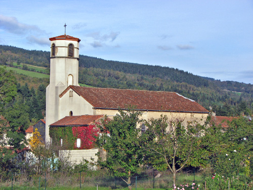 Eglise de LACABAREDE